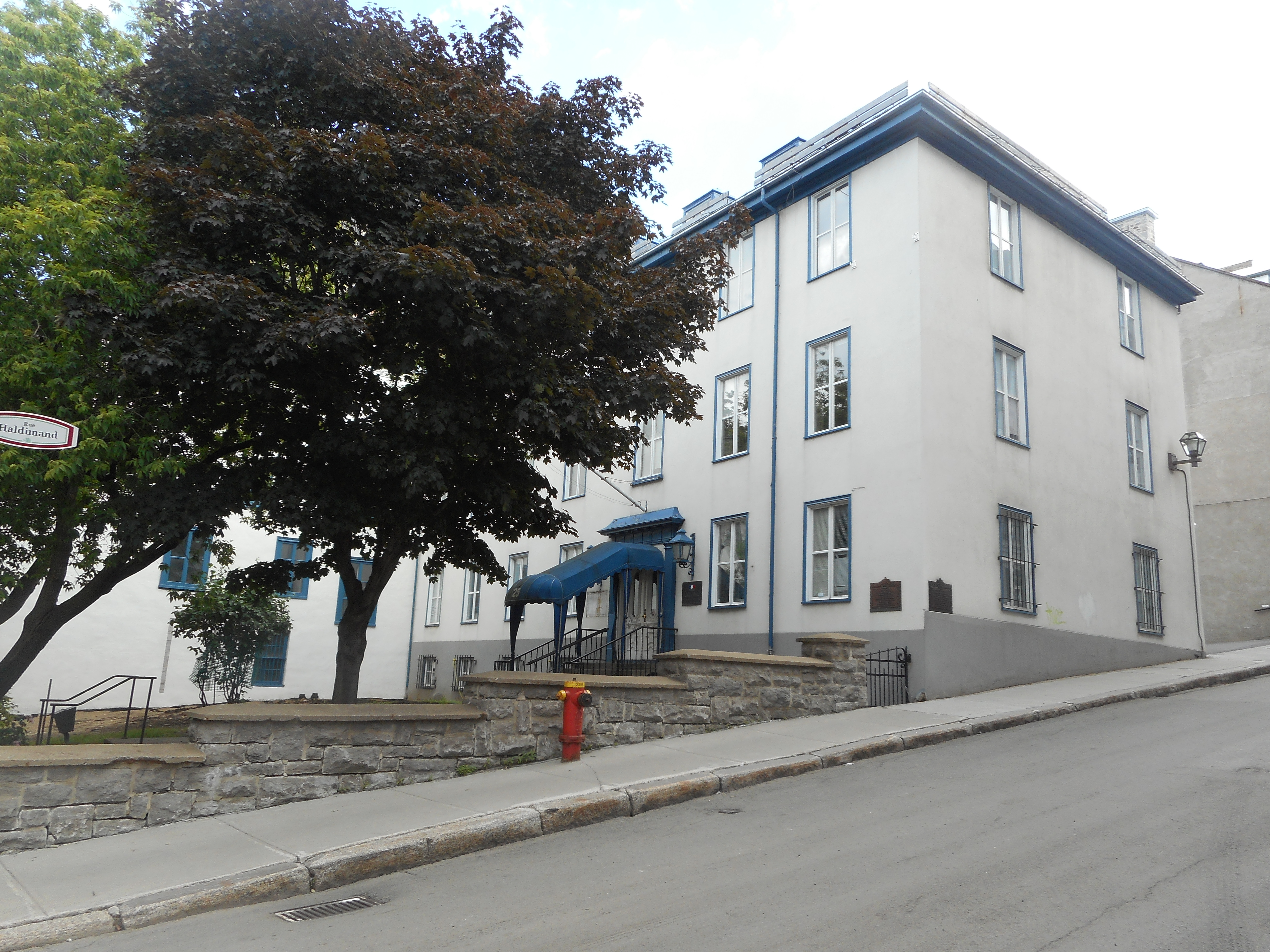 Maison du Duc-de-Kent, 25, rue Saint-Louis, Québec, construite en 1648 Le duc de Kent, père de la reine Victoria, y vécut de 1792 à 1794.